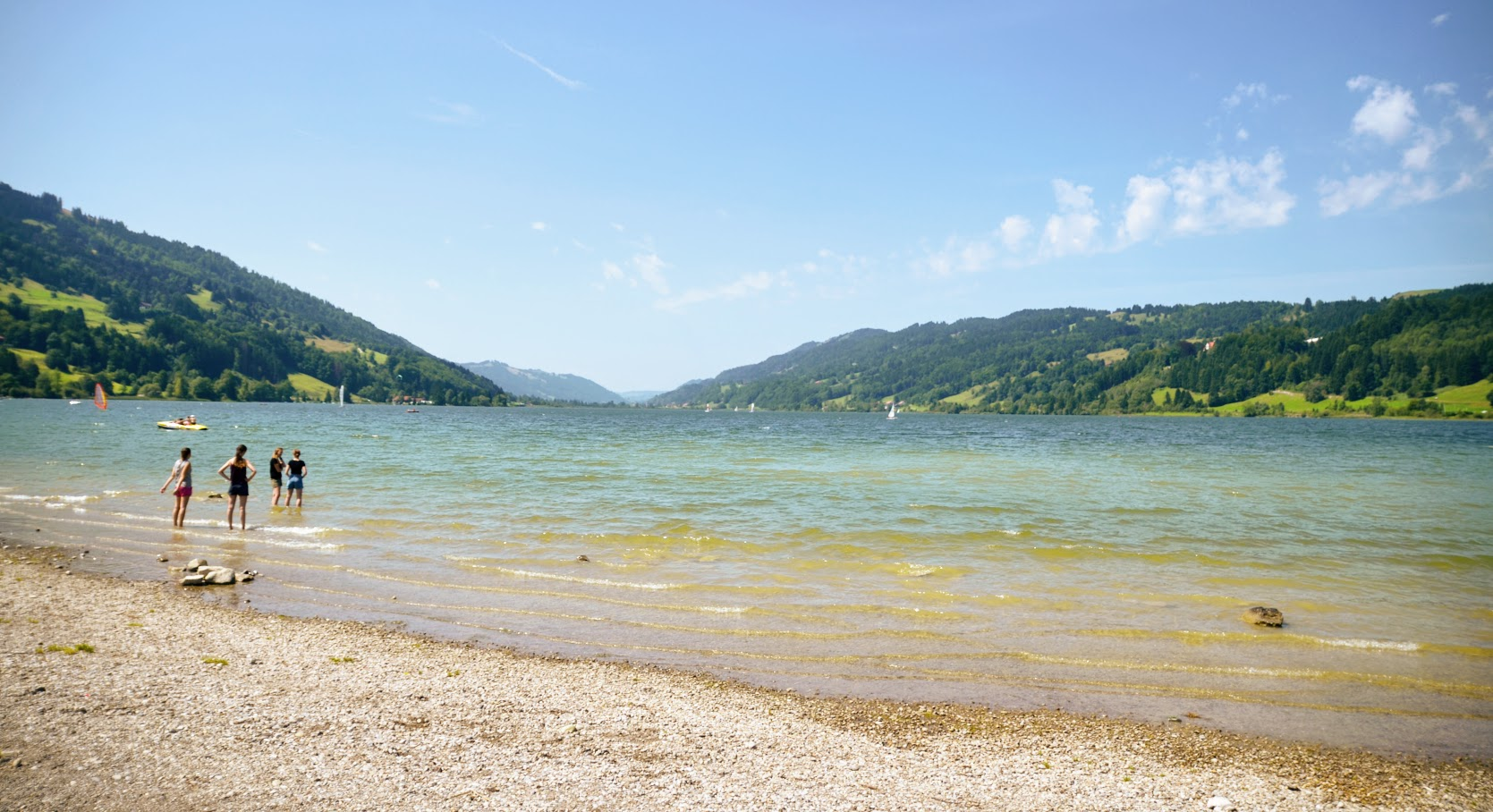 Großer Alpsee, Blick vom Ostufer (2017)